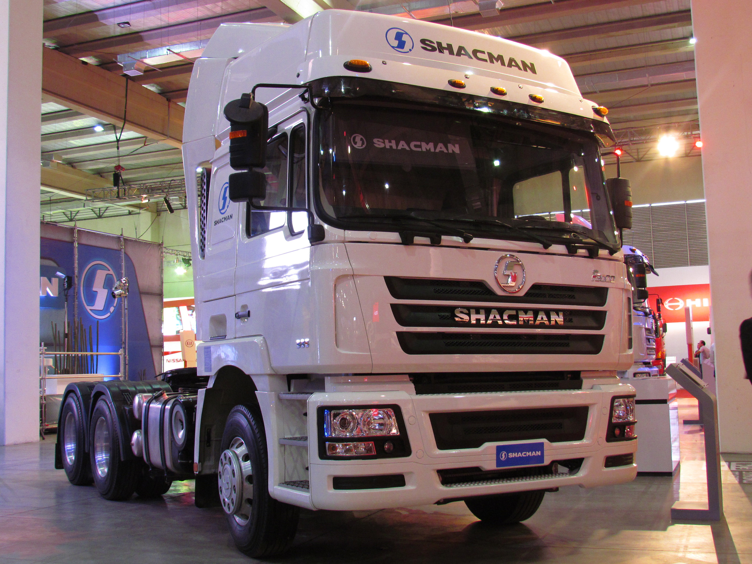 Shacman F 3000 385 6x4 2014